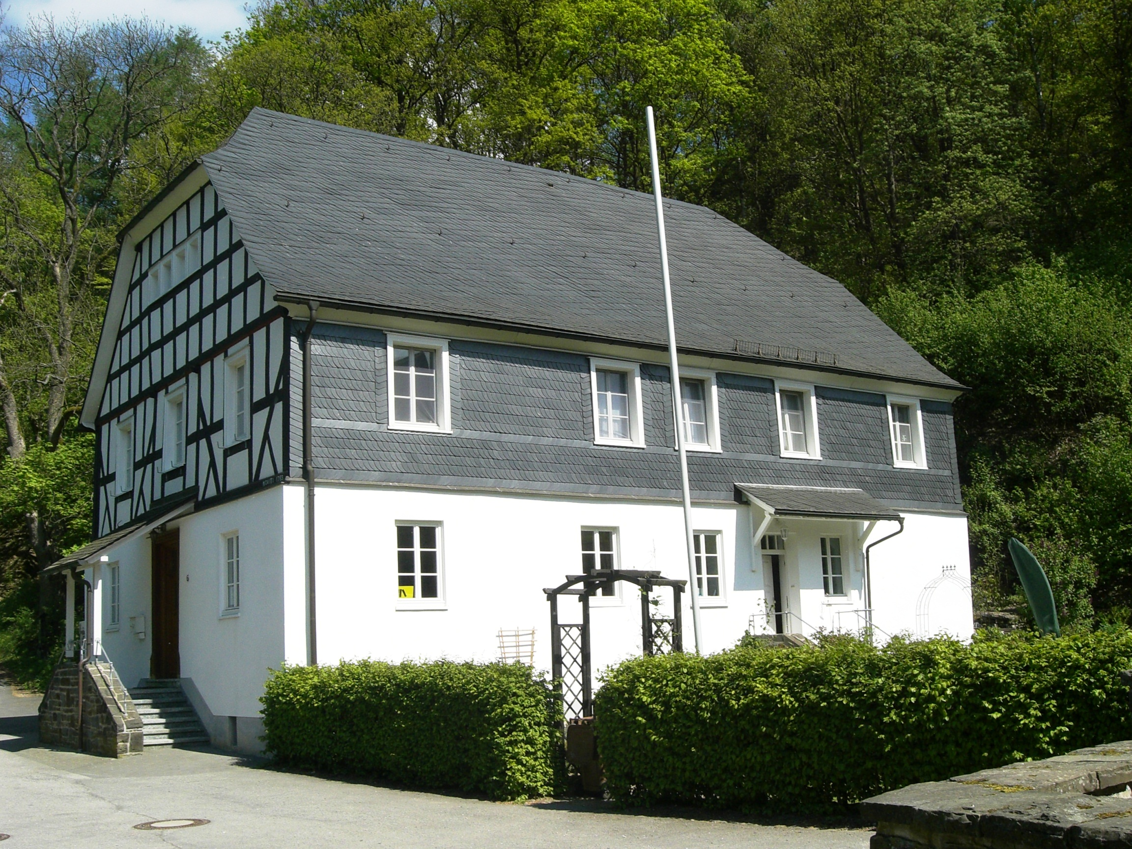 im Jahr 1784 erbautes Pfarrhaus, umgebaut im Jahr 1929, das Pfarrhaus steht unter Denklmalschutz